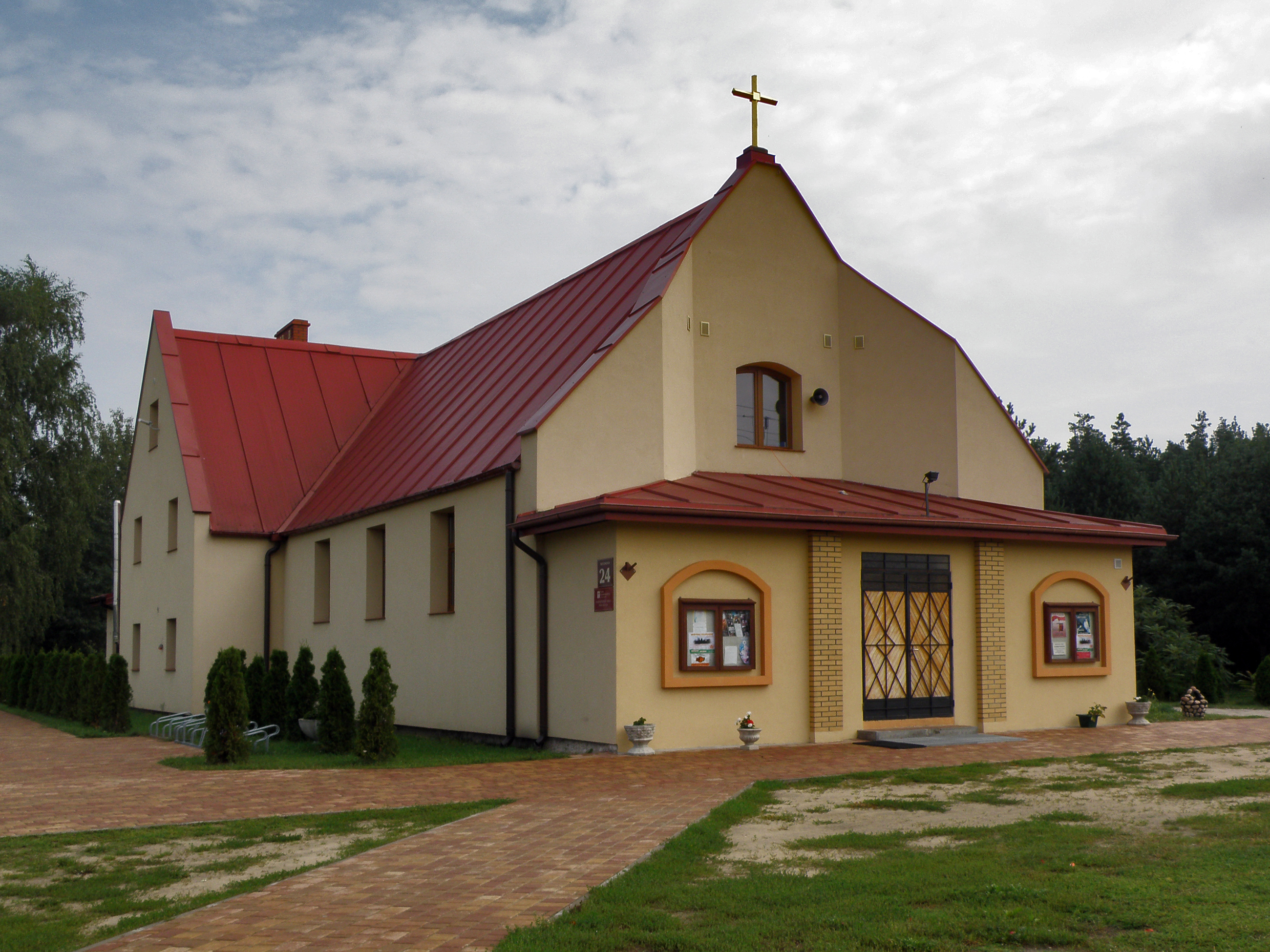 Polska, Pisz - Parafia rzymsko-katolicka Najświętszego Serca Pana Jezusa This photo of Warmian-Masurian Voivodeship was taken during Wikiexpedition 2012 set up by Wikimedia Polska Association. You can see all photographs in category Wikiekspedycja 2012. The making of this document was supported by Wikimedia Polska.